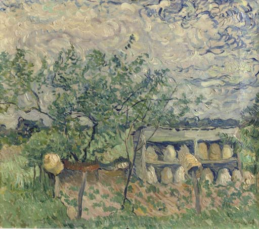 Bienenstöcke im Garten. Signiert H.Nauen.0.6. Öl auf Leinwand, 45 x 51 cm